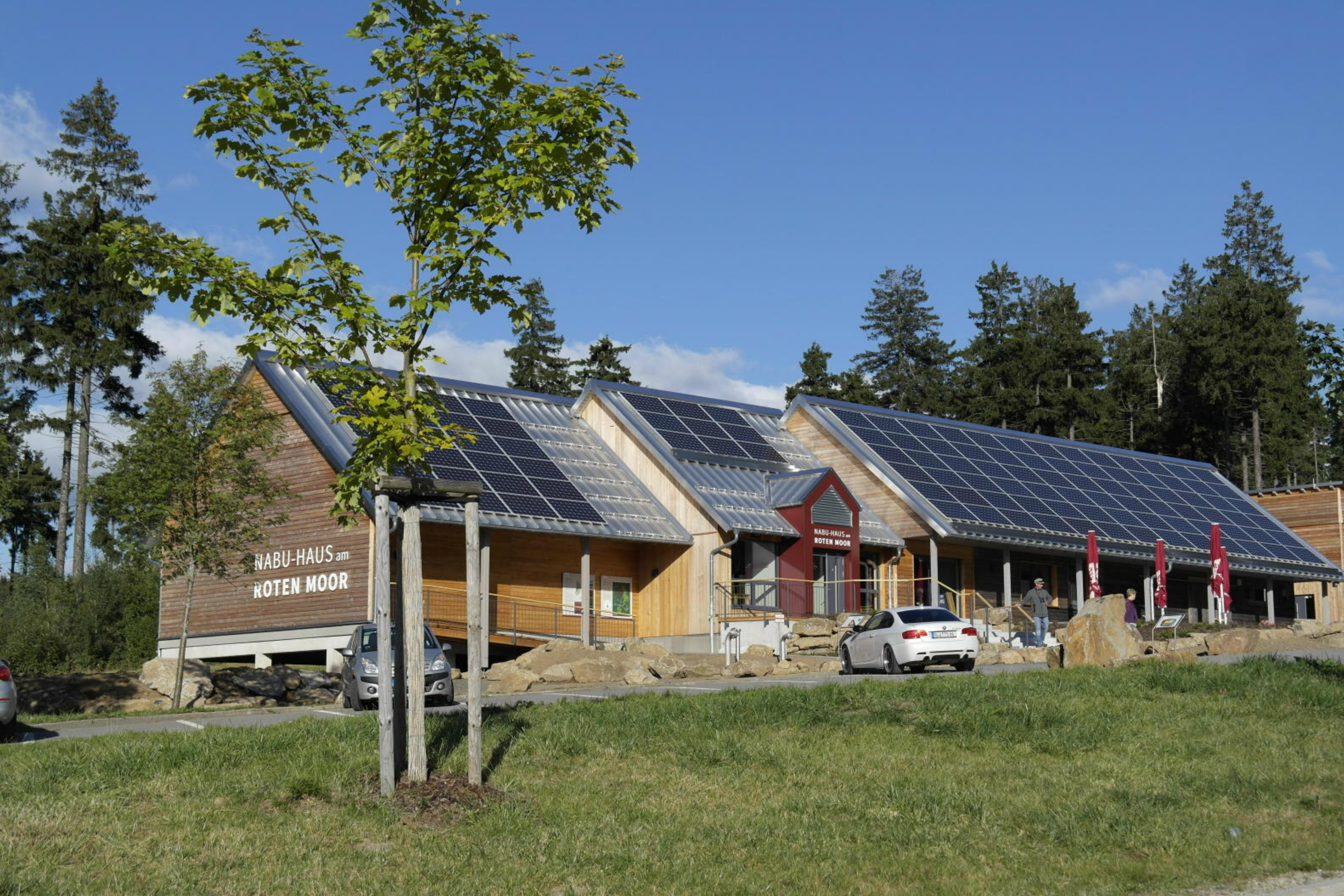 (NSG:HE-1631010)_Rotes Moor. Blick auf das Haus am Roten Moor.